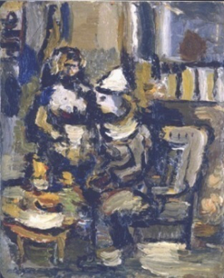 Tableau Le Repas du clown, de Léon Weissberg